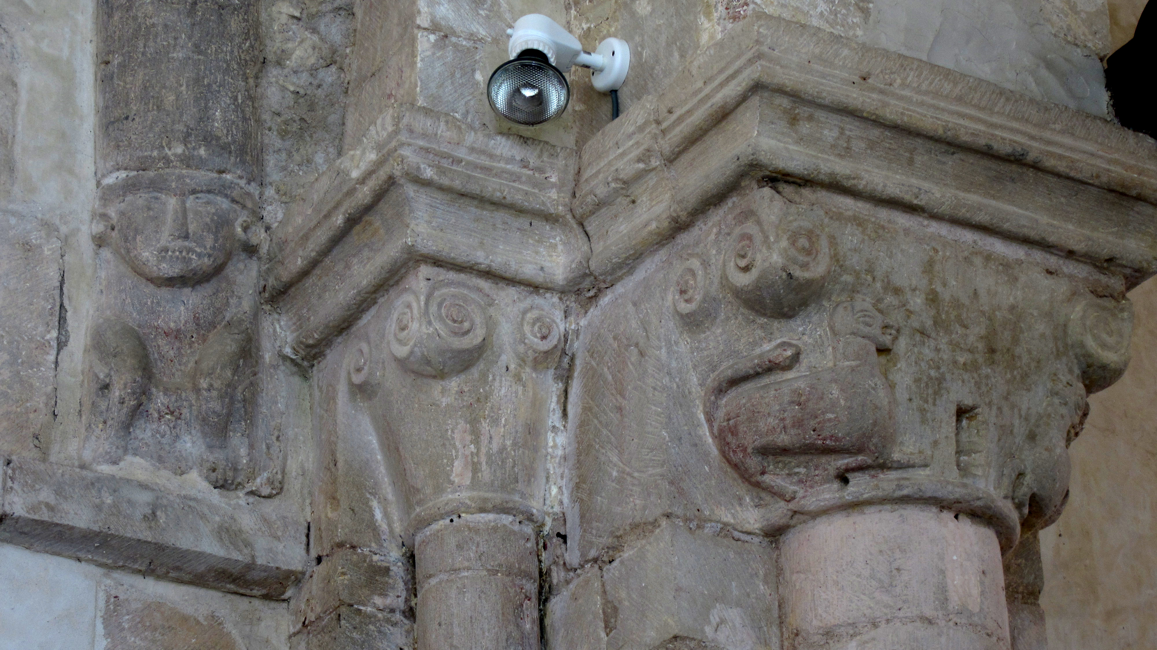 Église Saint-Martin de Tollevast, MAnche .